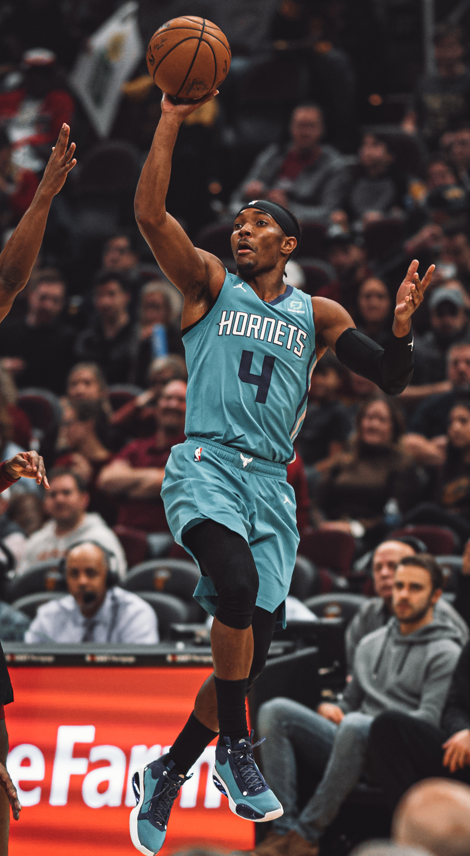 Cleveland Cavaliers vs. Charlotte Hornets